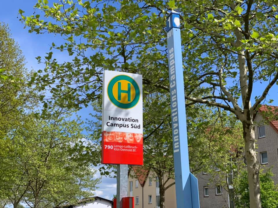 Das Bild zeigt die Haltestelle Innovation Campus Lemgo Süd der Buslinien 790 und der Stadtbuslinie 1